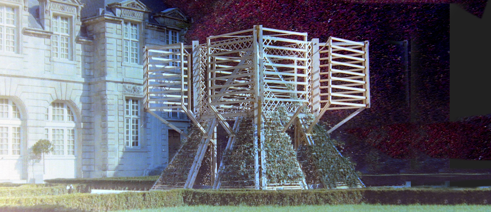 Vicenza, sculpture en treillage de bois et végétation, exposition Hôtel de Sully, Paris 1977